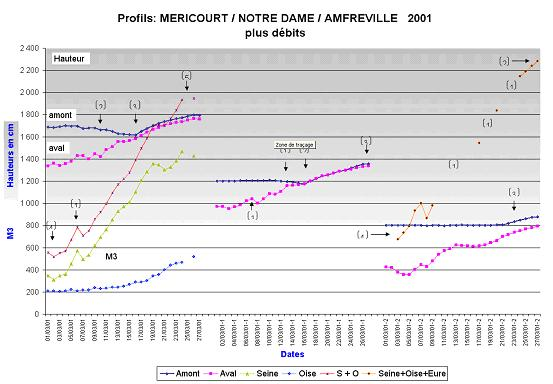 Ce graphique représente les courbes de niveaux amont / aval des trois derniers barrages de la Seine, à savoir Méricourt, Notre-Dame-de-la-Garenne et Amfreville-sous-les-Monts - Poses pour la période du 1er au 27 mars 2001. Les courbes en bas à gauche représentent les débits en m3/s de l'Oise, la Seine et Seine+Oise. La plus haute courbe en haut à droite va jusqu'à 2280 m3/s pour l'Oise + la Seine + l'Eure. En comparaison, à Mantes en 1910, le débit était de 2770 m3/s. Il faudrait ajouter le débit de l'Eure. Ce graphique indique qu'avant d'effacer totalement le barrage de ND-de-la-Garenne et presque totalement à Méricourt le 16 mars 2001, le niveau amont de Méricourt a été abaissé de 80 cm sans aucune gène à la navigation commerciale. Par contre à ND-de-la-Garenne et Amfreville, aucune action préventive n'est remarquable.